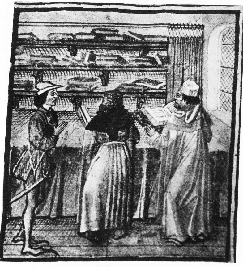 Eustache Marcadé Passion Arras 1430 Counselors of Herod